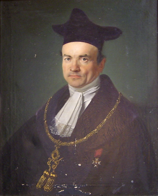 Adelbert von Keller, Rektor der Universität Tübingen